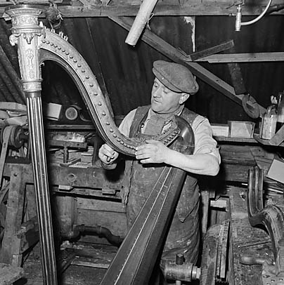 Teitl Cymraeg/Welsh title: Wilfred Hughes, y crefftwr a'r trwsiwr telynau o Fron Lledrod, Llansilin, wrth ei waith Cyfrwng/Medium: Negydd ffilm / Film negative Cyfeiriad/Reference: (gch09341) Rhif cofnod / Record no.: 3369248 Rhagor o wybodaeth am gasgliad Geoff Charles yn Llyfrgell Genedlaethol Cymru More information about the Geoff Charles Collection at the National Library of Wales Mae ffotograffau Geoff Charles hefyd yn rhan o Broject Europeana Libraries Geoff Charles' photographs also form part of the Europeana Libraries Project